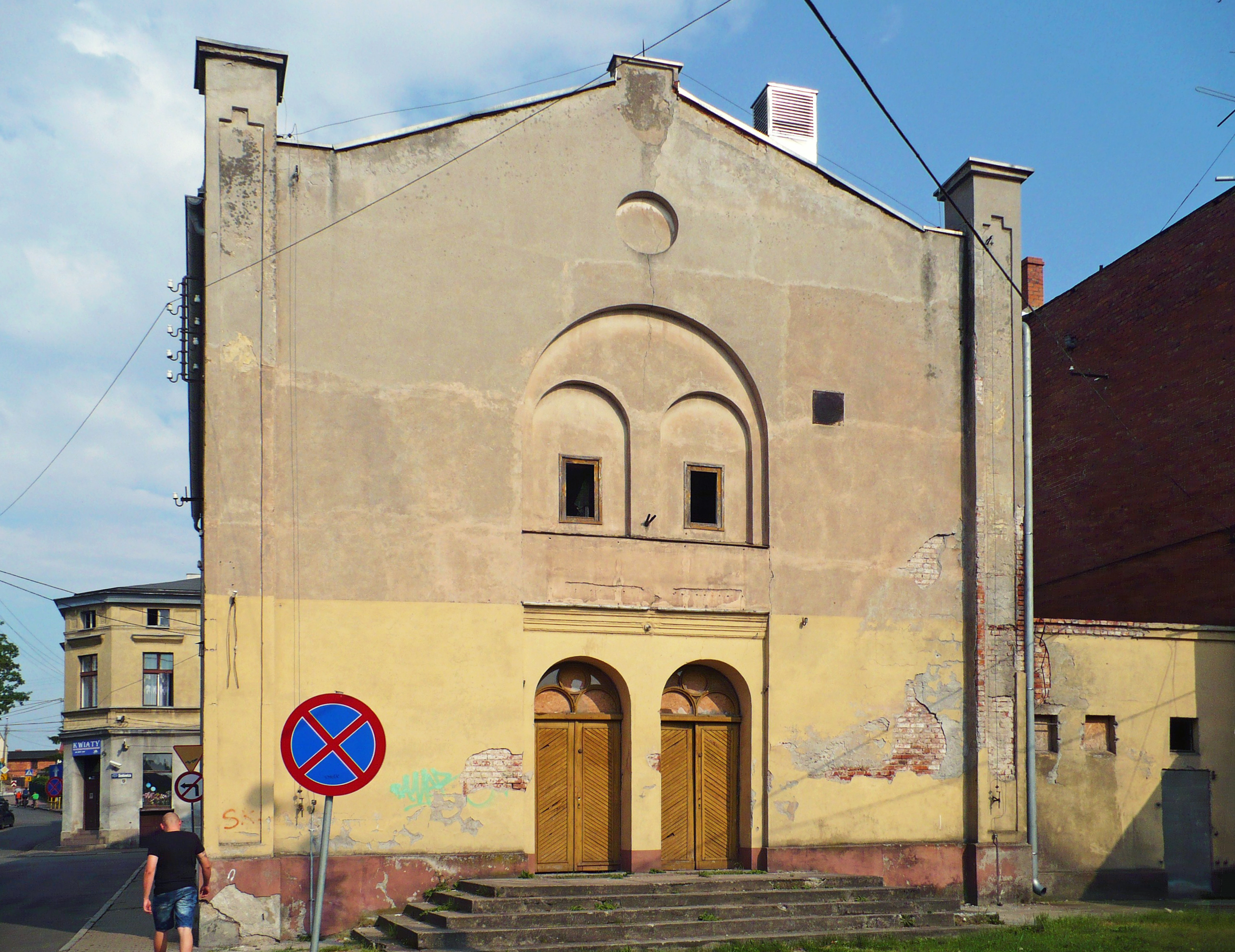 Koronowo, synagoga (od 1938 Towarzystwo Gimnastyczne "Sokół"), 1858